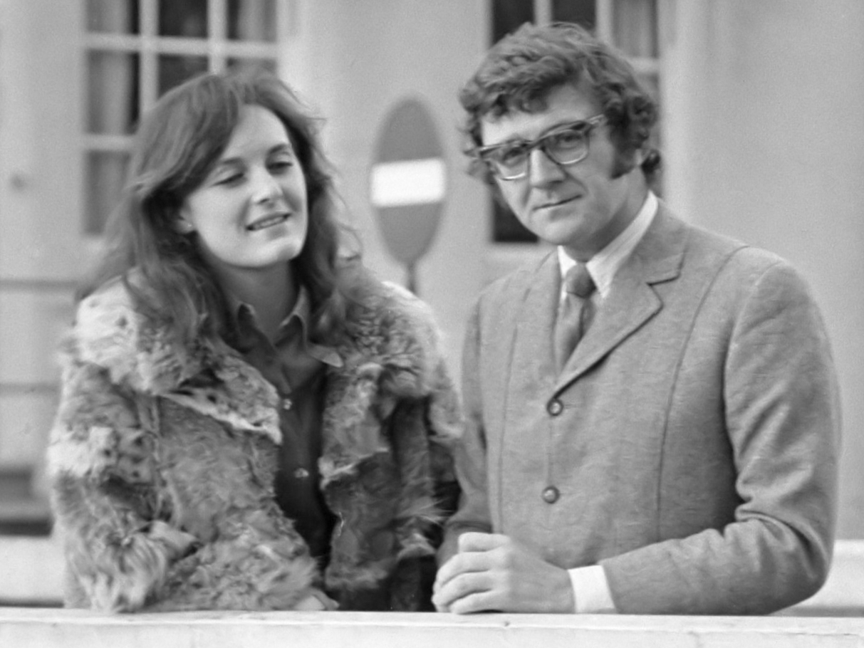 TV-regisseur Kevin Billington en echtgenote Lady Rachel in binnenstad van Amsterdam (regisseur film "Interlude") 12 november 1968